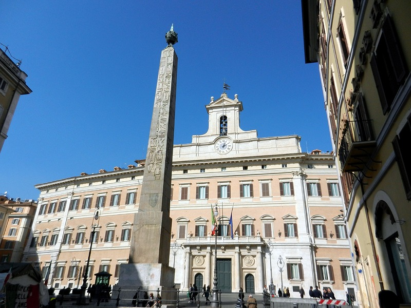 Roma - Palazzo di Montecitorio e l'Obelisco di Psammetico II